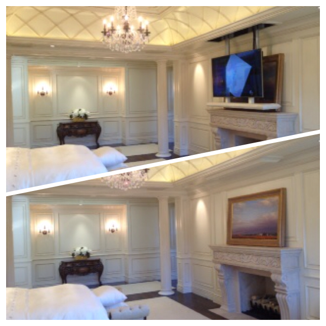 vertivcal Drop-down lift